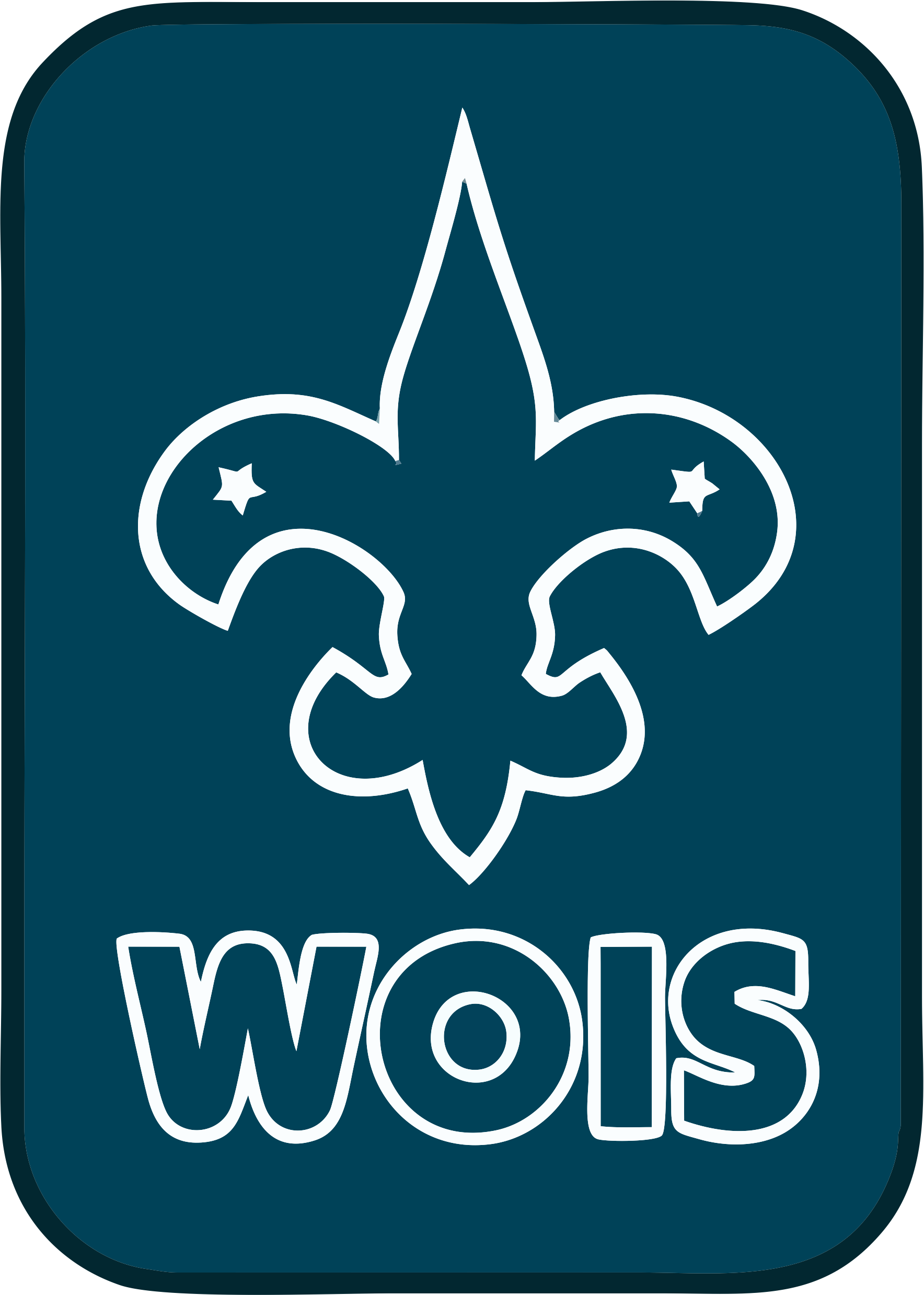 Flor de lis de la Organización Mundial de Scouts Independientes